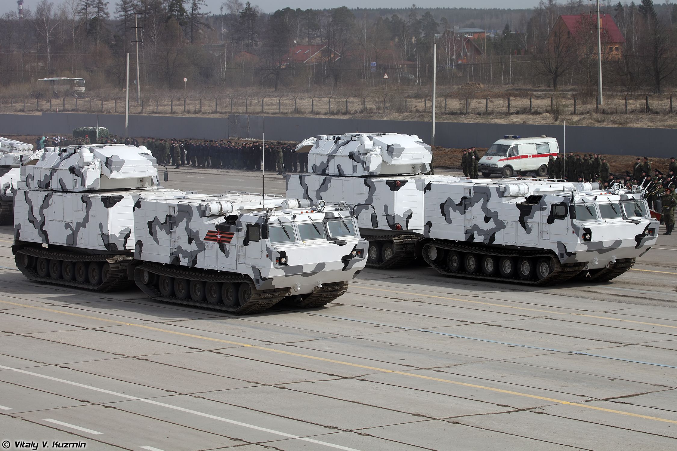 ЗРК 9К331МДТ Тор-М2ДТ на базе двухзвенного гусеничного транспортера ДТ-30ПМ (9K331MDT Tor-M2DT air defence system on DT-30PM transporter chassis)